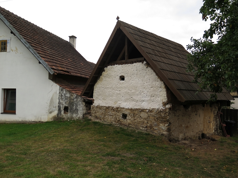 Sýpka u čp. 6, Domažličky 6, Domažličky.